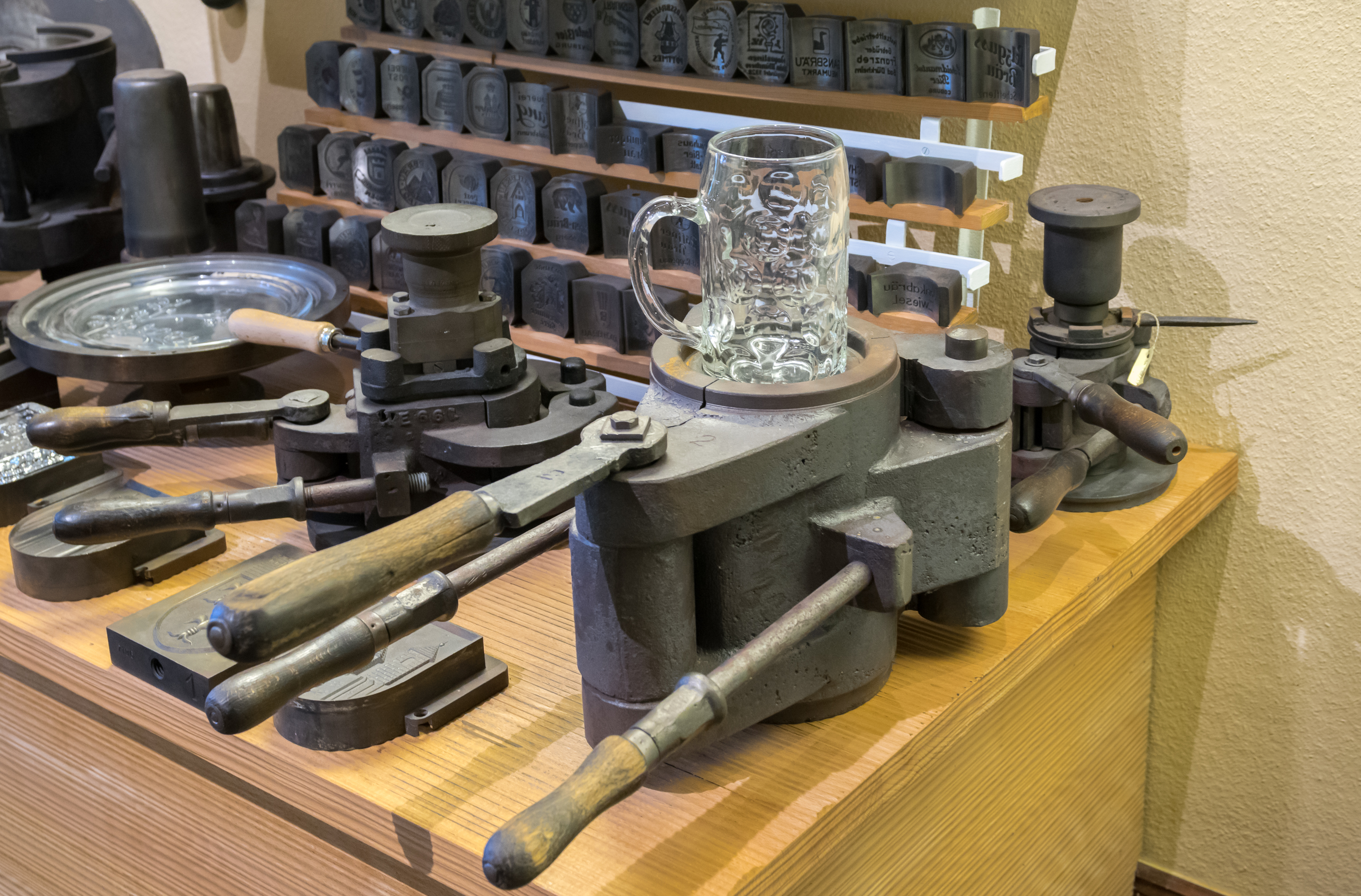 Glasmuseum Boffzen; Presse und Motivformen zur individuellen Kennzeichnung von Gläsern